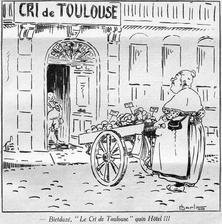 La première apparition de Catinou dans 'Le Cri de Toulouse', le 4 décembre 1927, p.255.